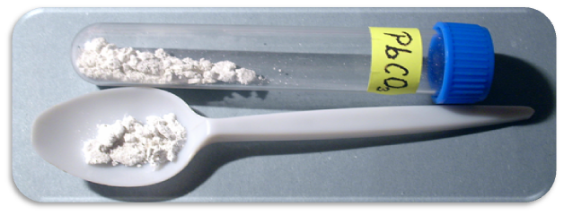 Uhličitan olovnatý - PbCO3